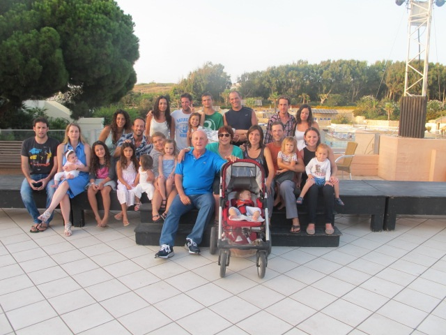 משפחת גפן מידן